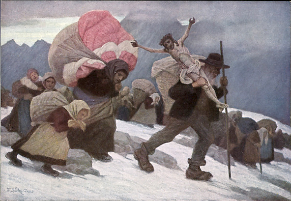 Die Heimatlosen - Vertriebene Bürger auf der Flucht